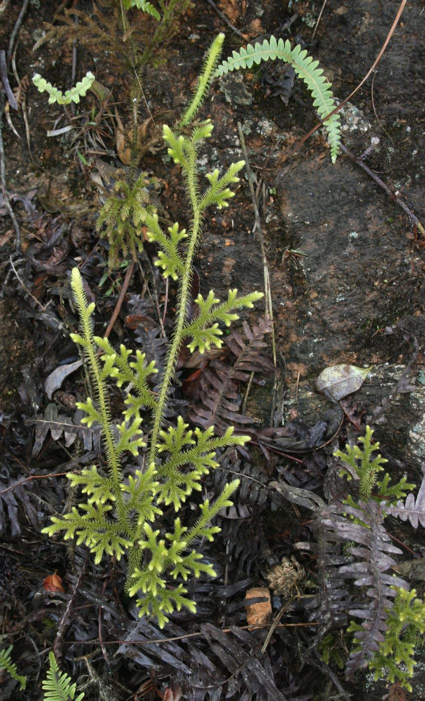 Lycopodiella cernua , Bärlappgewächse (Lycopodiaceae) - Vietnam/Việt Nam: Dorf Tả Phìn nördlich von Sa Pa (Prov. Lào Cai)